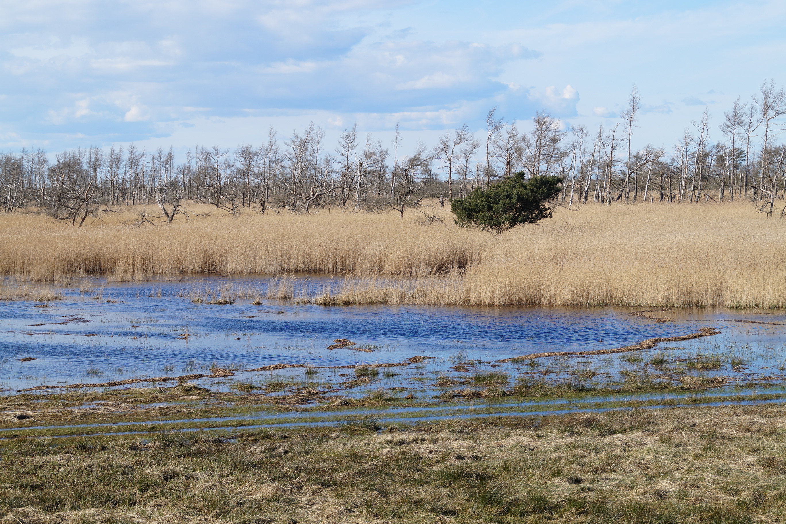 Ausschnitt Hütelmoor, Naturschutzgebiet „Heiligensee und Hütelmoor“